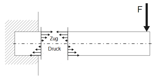 Kragbalken: Biegespannungen (Druck- und Zug-) bei Biegebeanspruchung